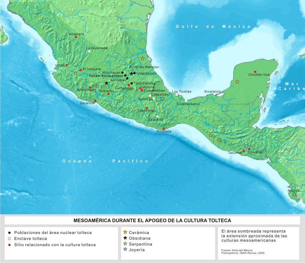 Mesoamérica durante el apogeo de la cultura tolteca (ss. X-XII d.C.)